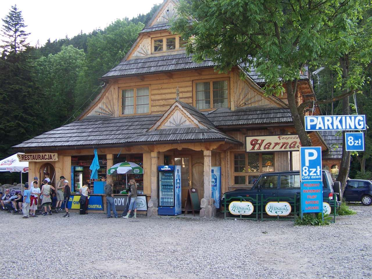 Kiry